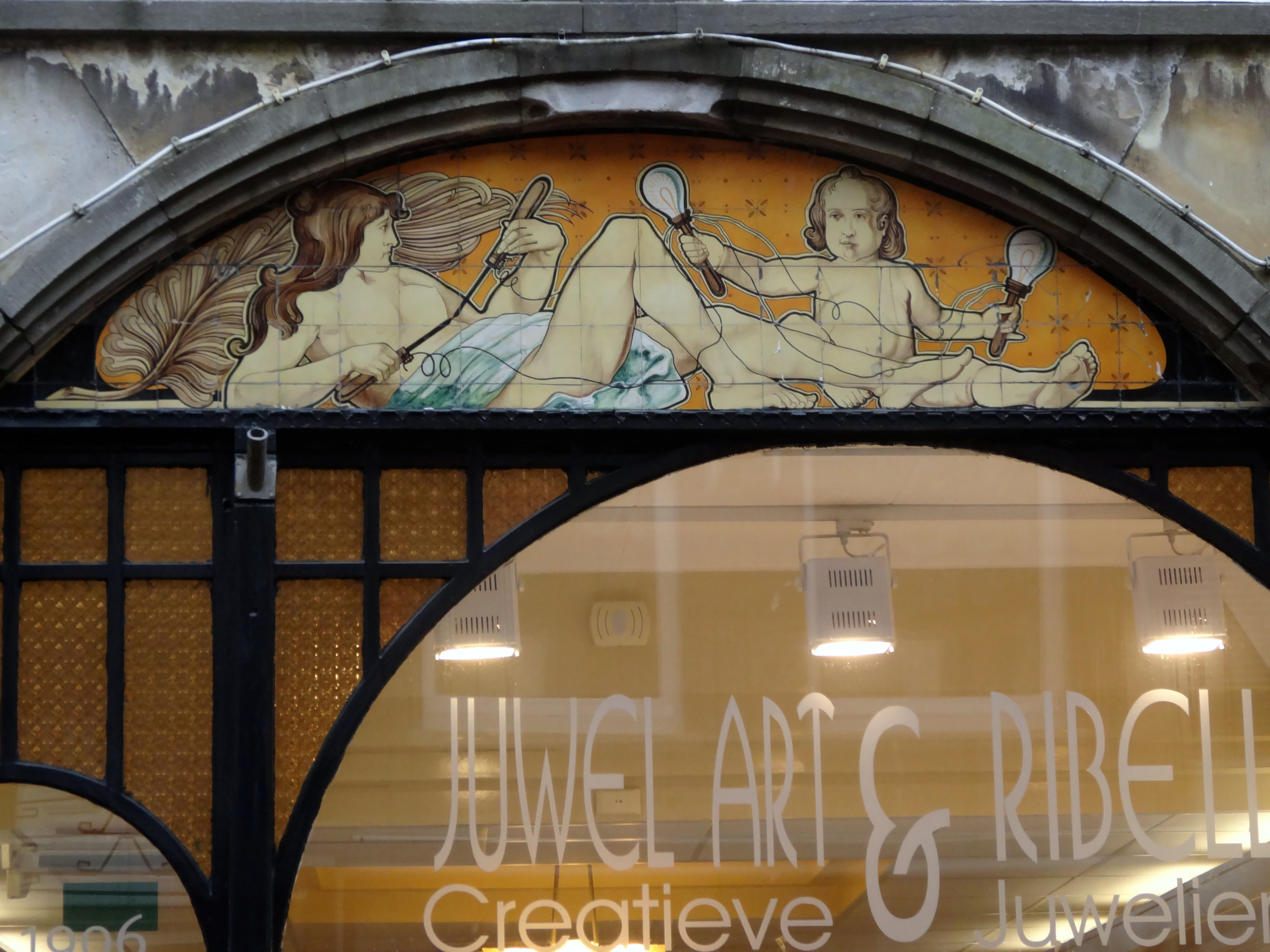 LangeTiendeweg 18 te Gouda